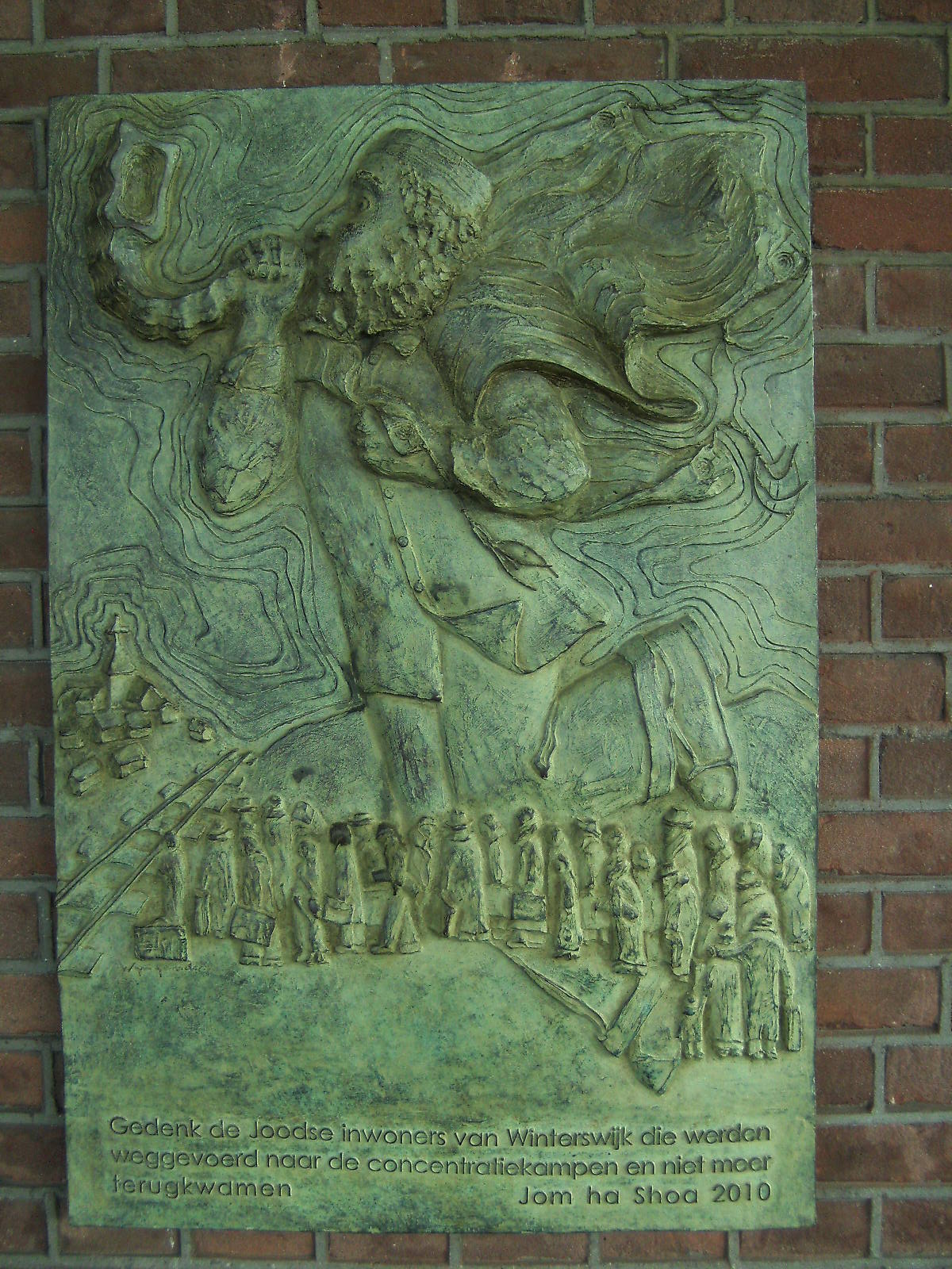 De Sjofar, bronzen plaquette van Jip Wijngaarden uit 2010 in het station ter nagedachtenis aan de Joden die in 1940-45 vanuit Winterswijk werden weggevoerd. (Jom Hasjoa)